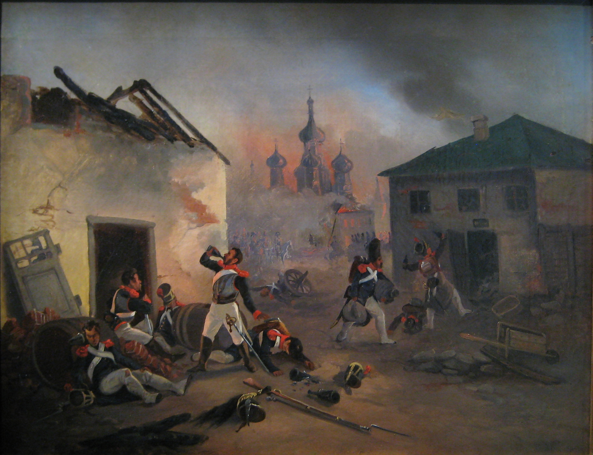 Музей "Бородинская панорама"